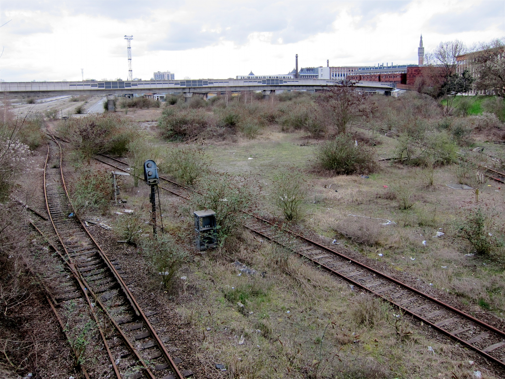 Vue de la friche de la gare Saint-Sauveur à Lille (Nord, Nord-Pas-de-Calais, France).